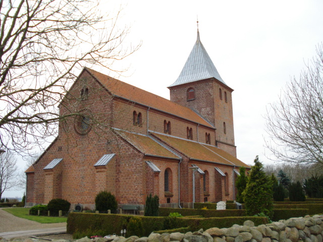 Uth Kirke ved Horsens, fotograferet af undertegnede